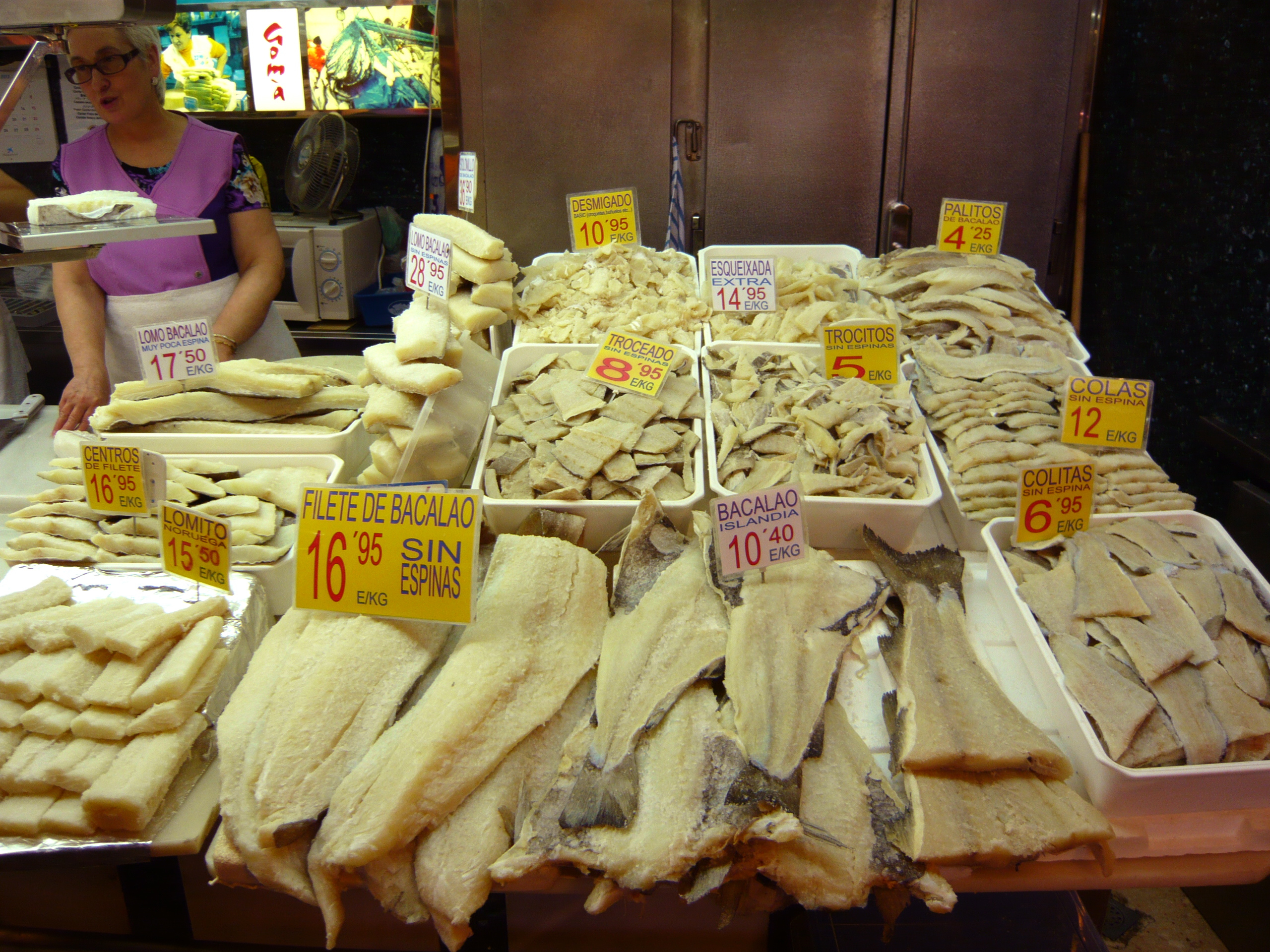 Bacalao